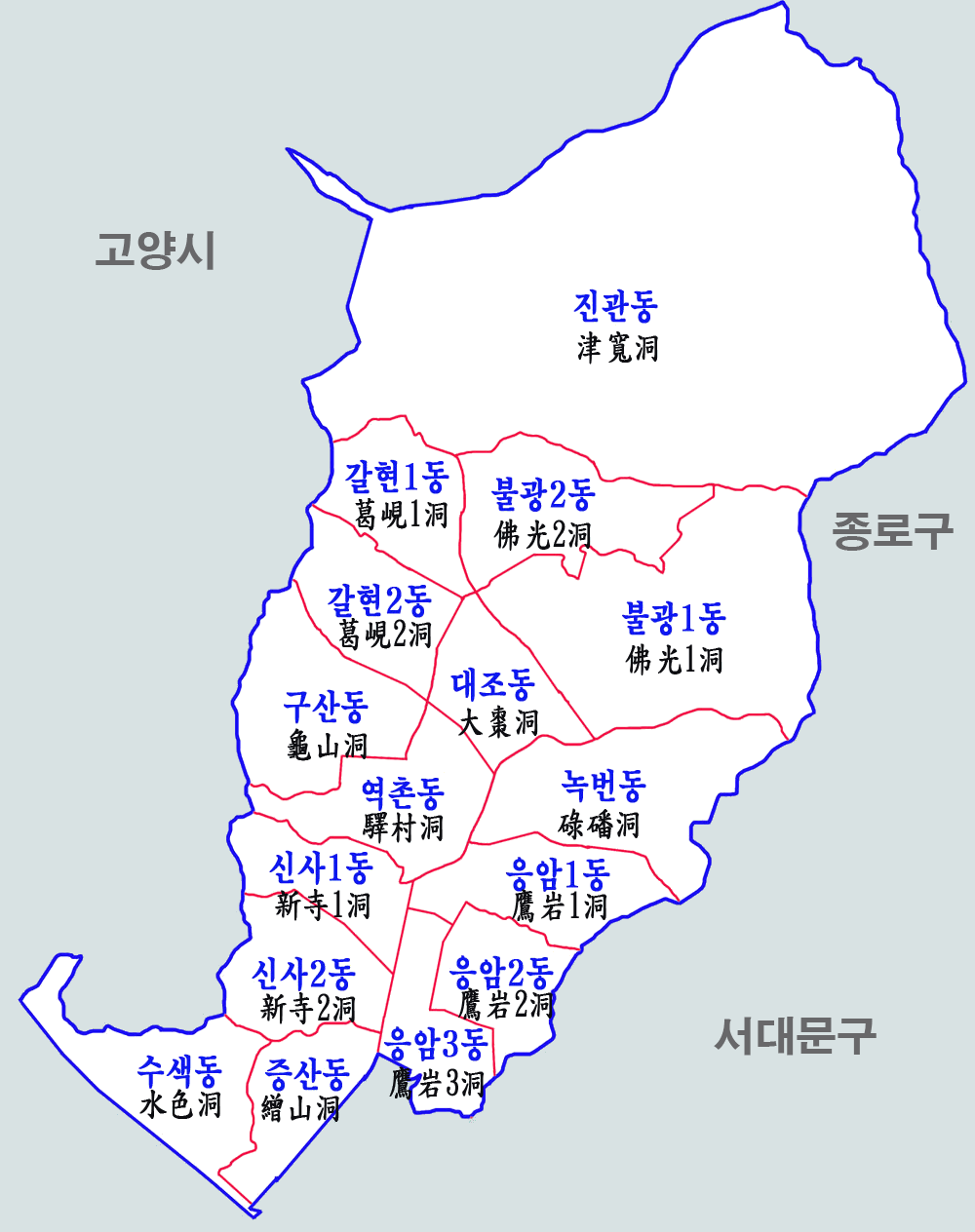 서울시 은평구 행정구역도